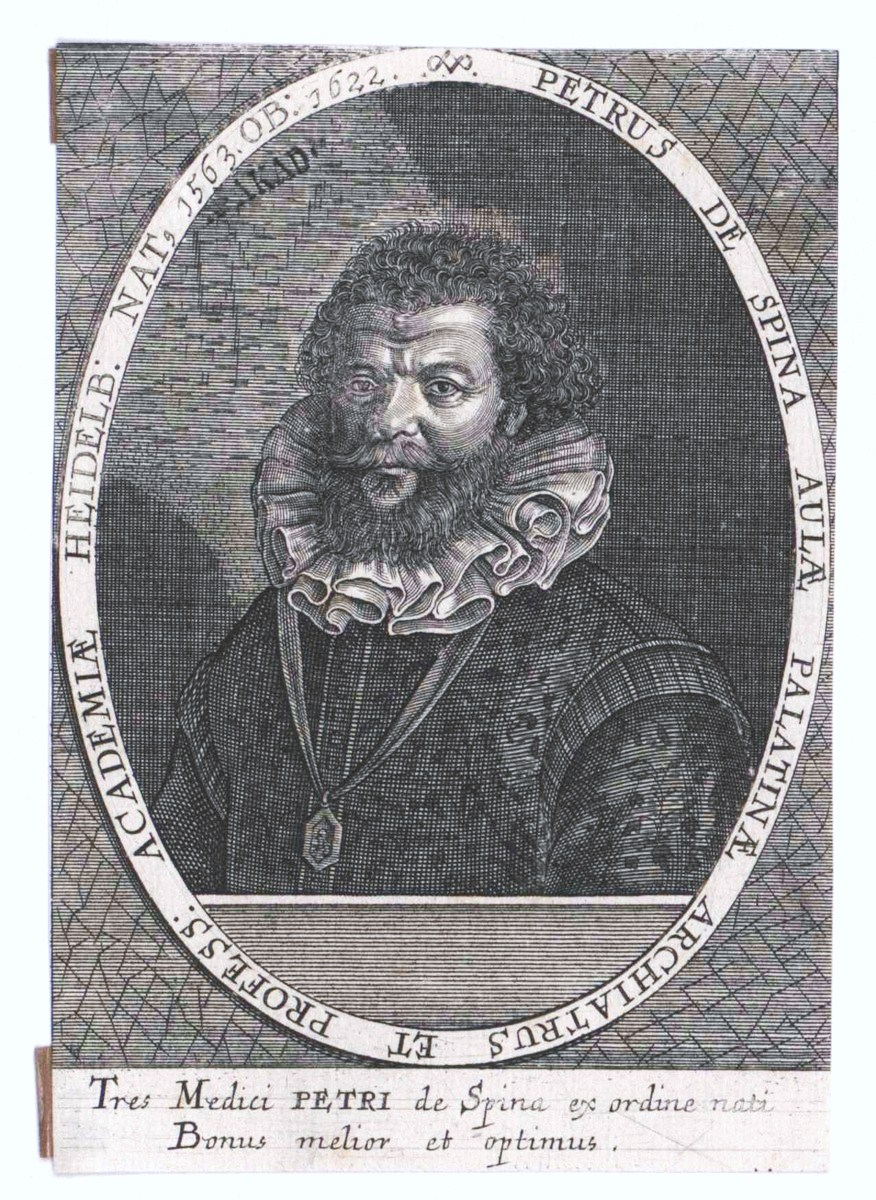 Scan eins Portrait aus dem Bildarchiv Austria